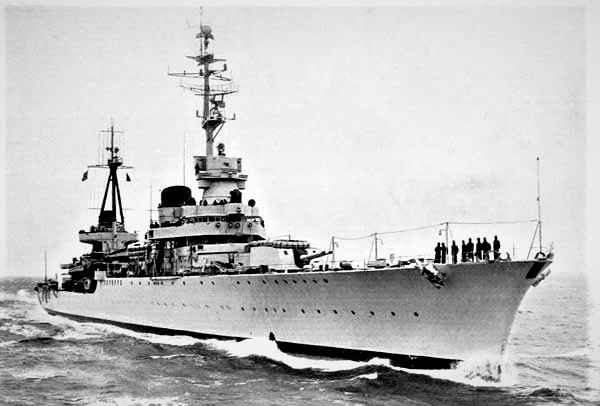 The cruiser Raimondo Montecuccoli in navigation.